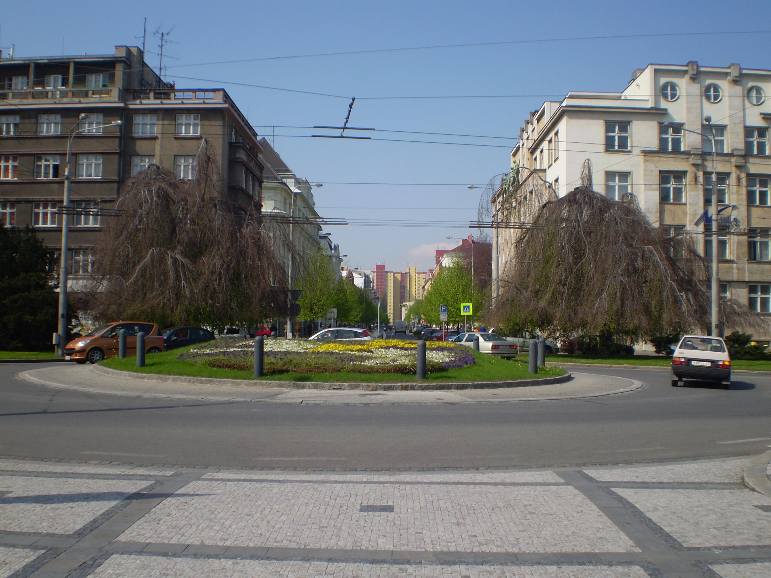 Kruhový objezd na Prokešově náměstí v Ostravě.